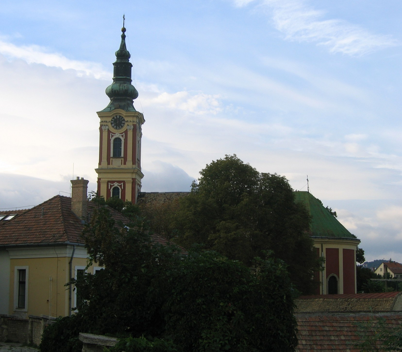 Szentendre, Hungary, Serbian Orthodox Belgrade Church